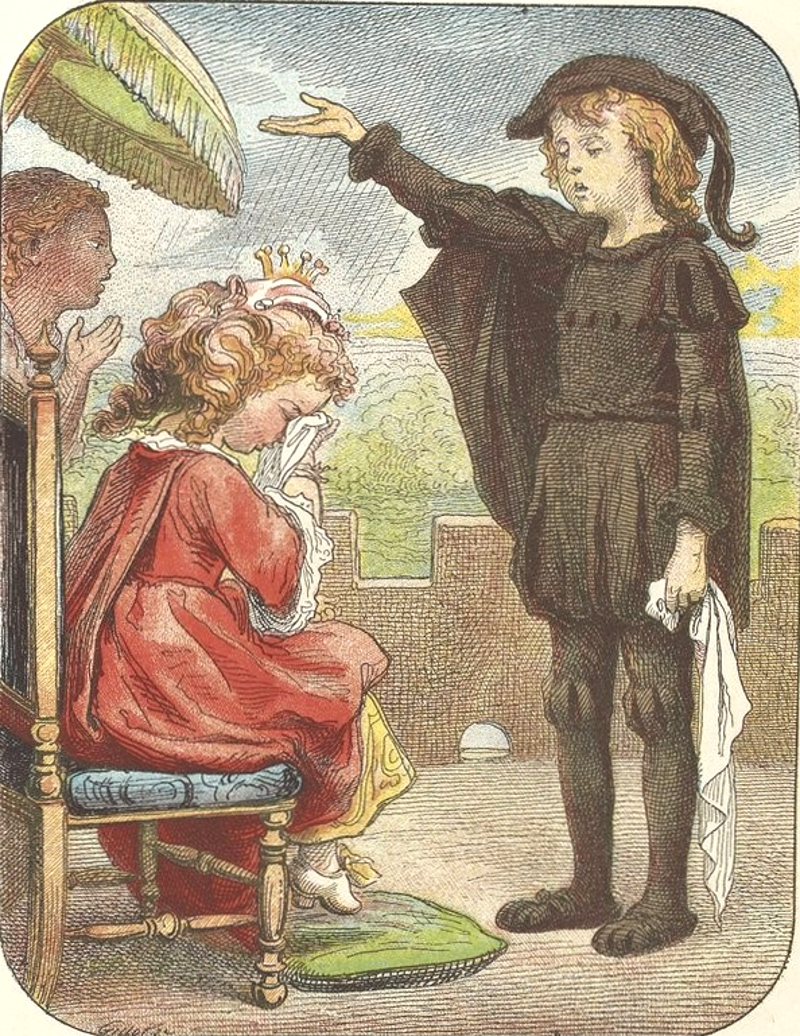 Malbrough s'en va-t-en guerre, 1878, dessins par Frølich (1820-1908), textes par Stahl, Hetzel éditeur ː page 5.